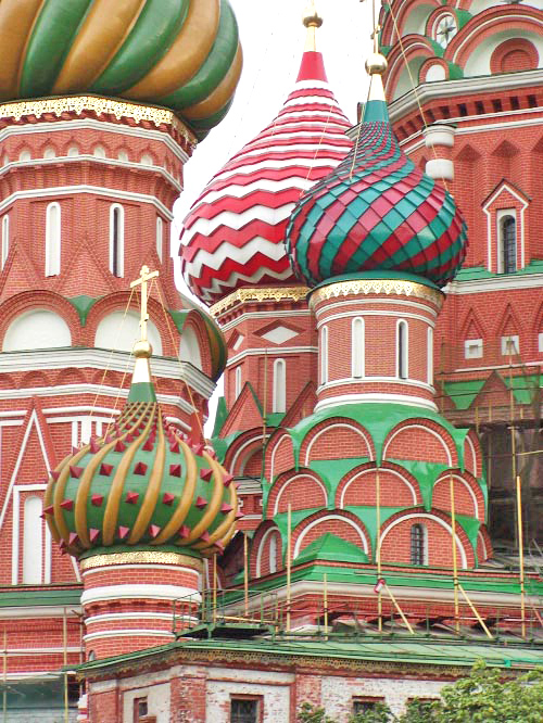 Ënnentierm vun der Basilius-Kathedral zu Moskau